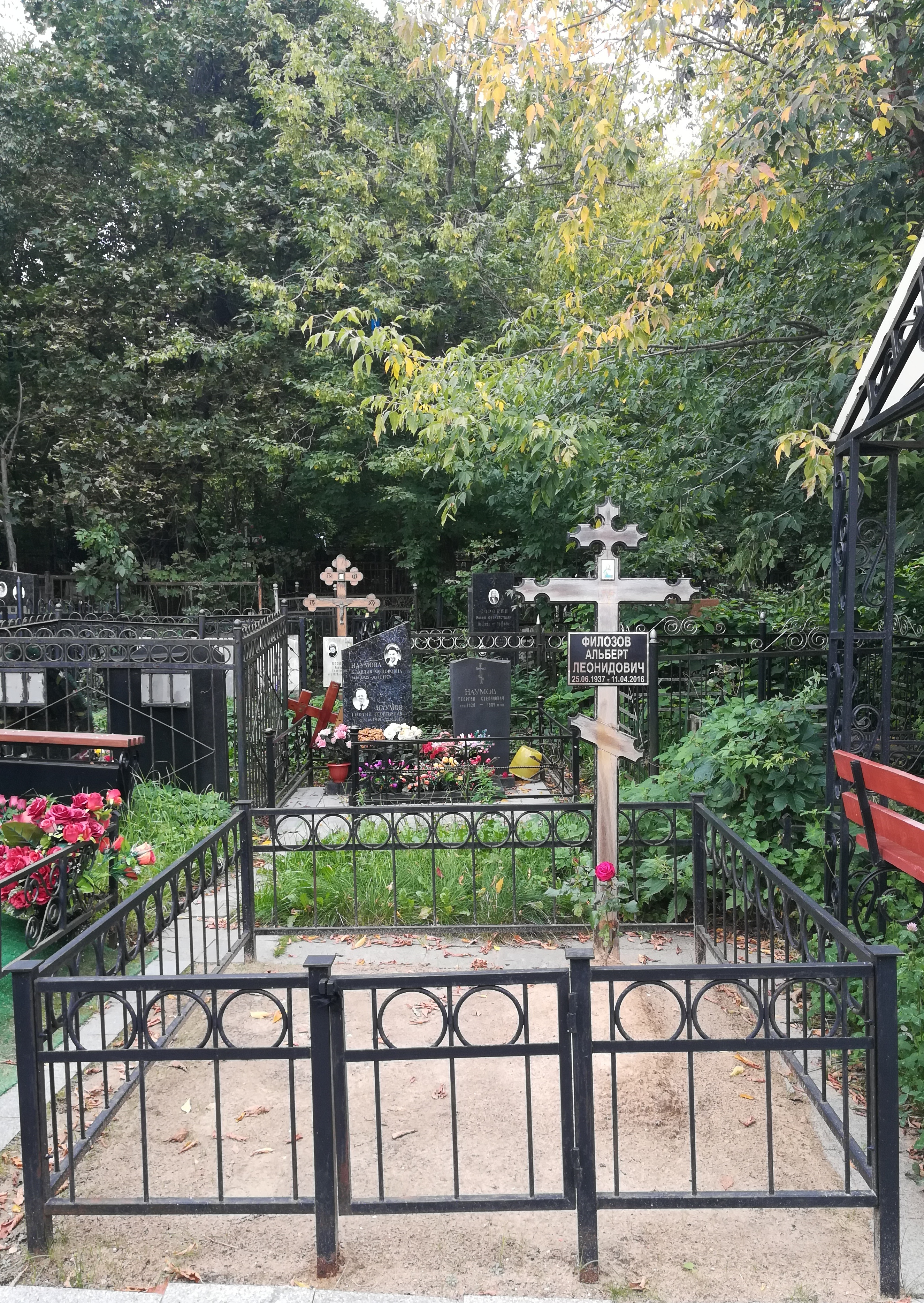 Могила Альберта Филозова